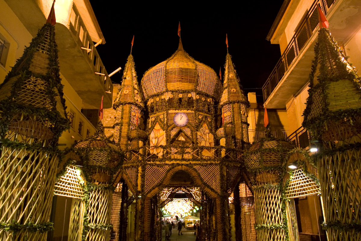 Archi di Pasqua 2007, San Biagio Platani, Agrigento, Italy